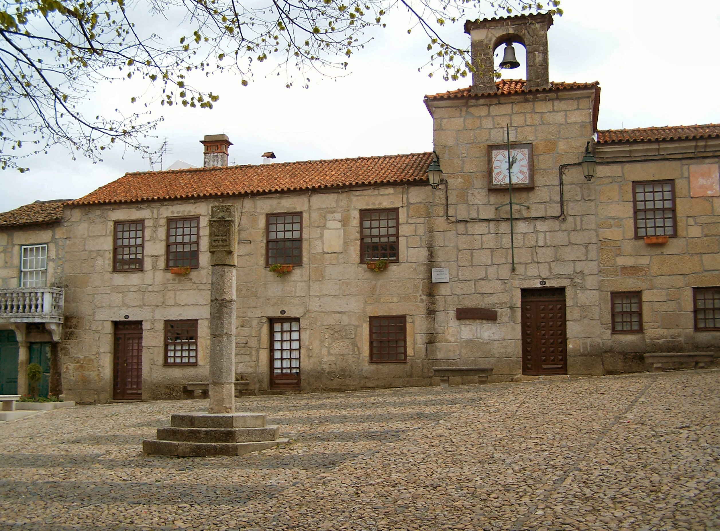 Pelourinho em Belmonte